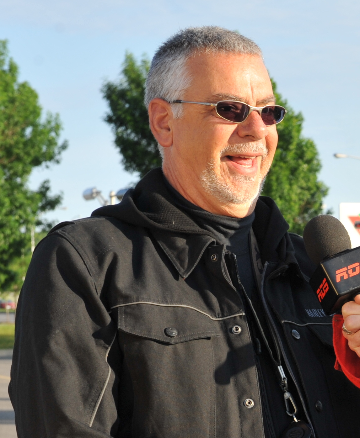 Éric Ménard, du Show de moto de RDS, en a profité pour effectuer quelques entrevues avec les participants. On le voit d'ailleurs avec monsieur Jacques Dupuis.